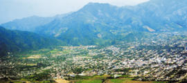 vista en miniatura de la cordillera de mico quemado en el valle de sula